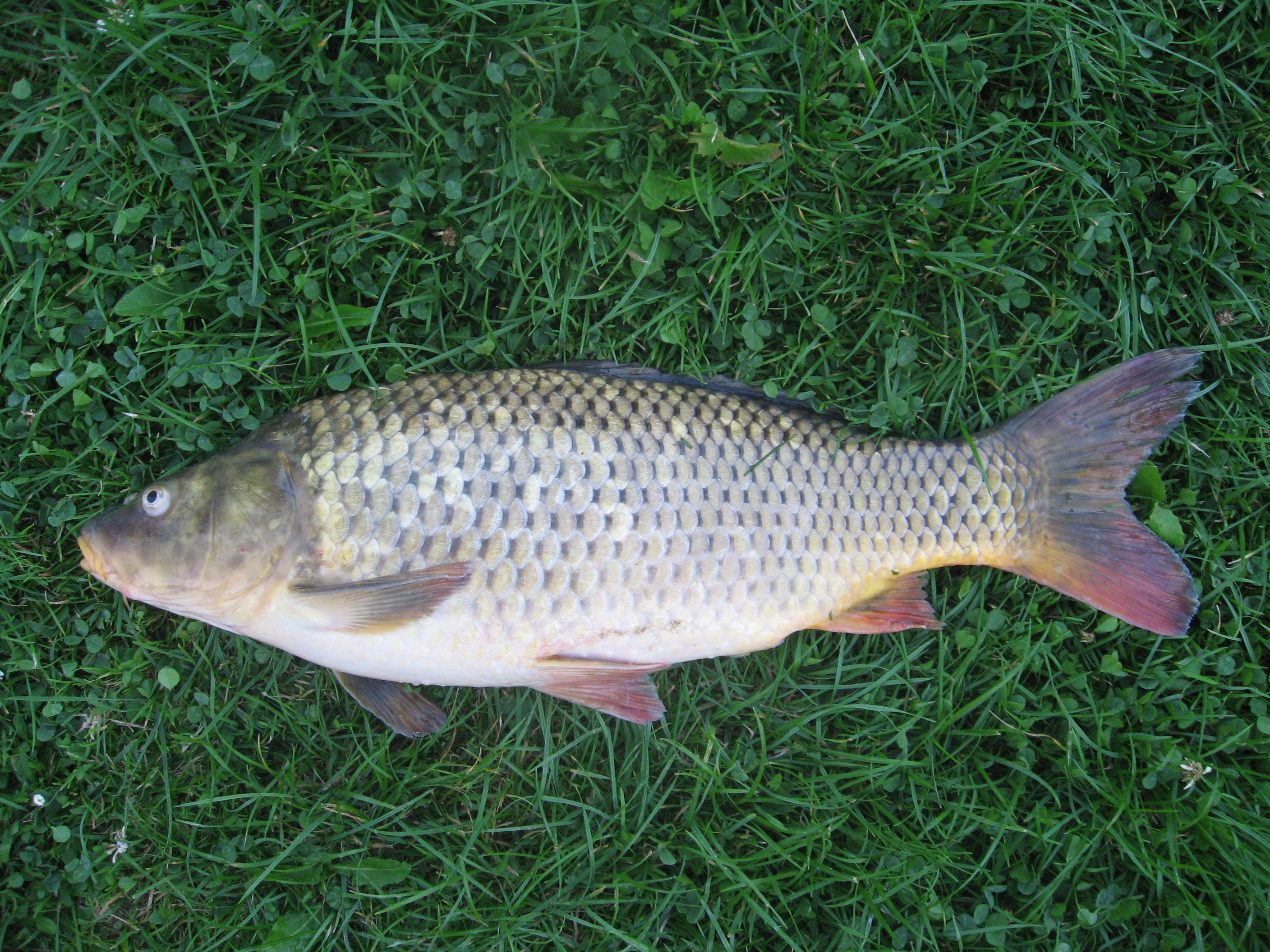 Kapr obecný